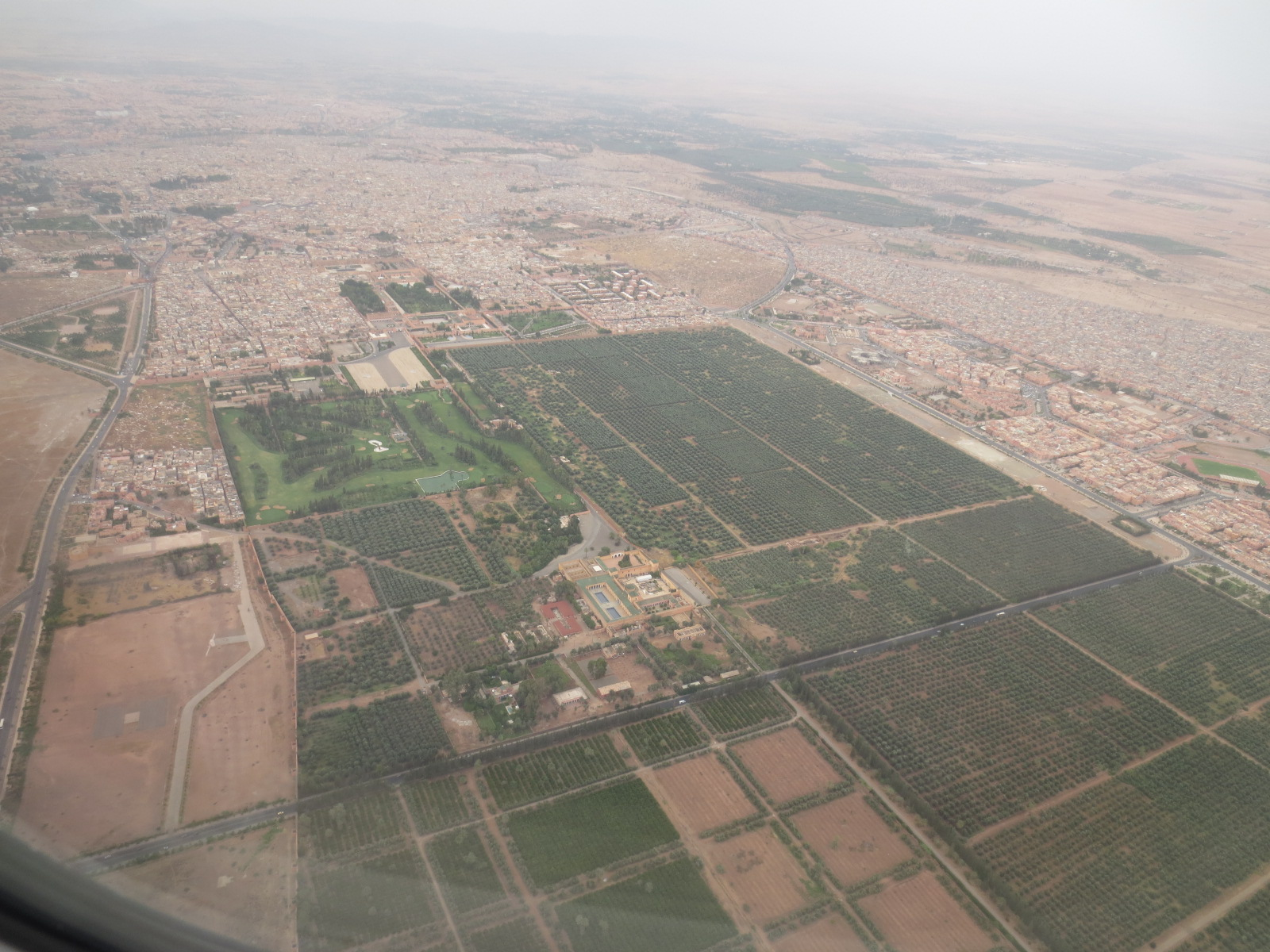 Marrakech-Menara Airport